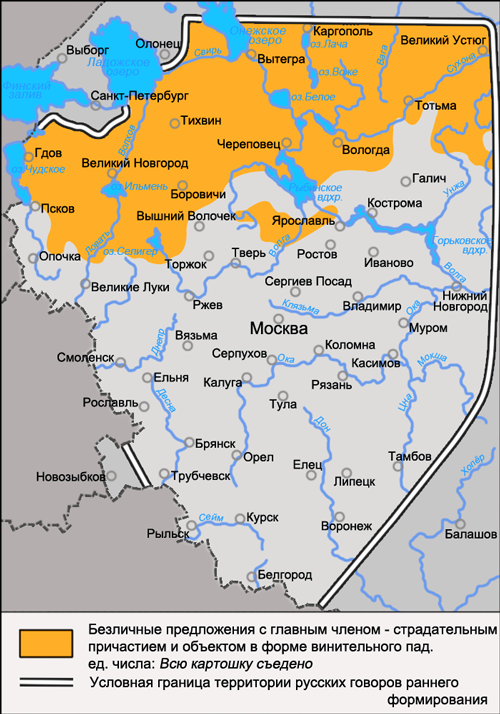 Карта распространения диалектного явления русского языка в области синтаксиса: безличные предложения с главным членом - страдательным причастием и объектом в форме винительного пад. ед. числа: Всю картошку съедено. Источник: Захарова К. Ф., Орлова В. Г. Диалектное членение русского языка — 2-е изд. — М.: Едиториал УРСС, 2004. — ISBN 5-354-00917-0, с. 86.